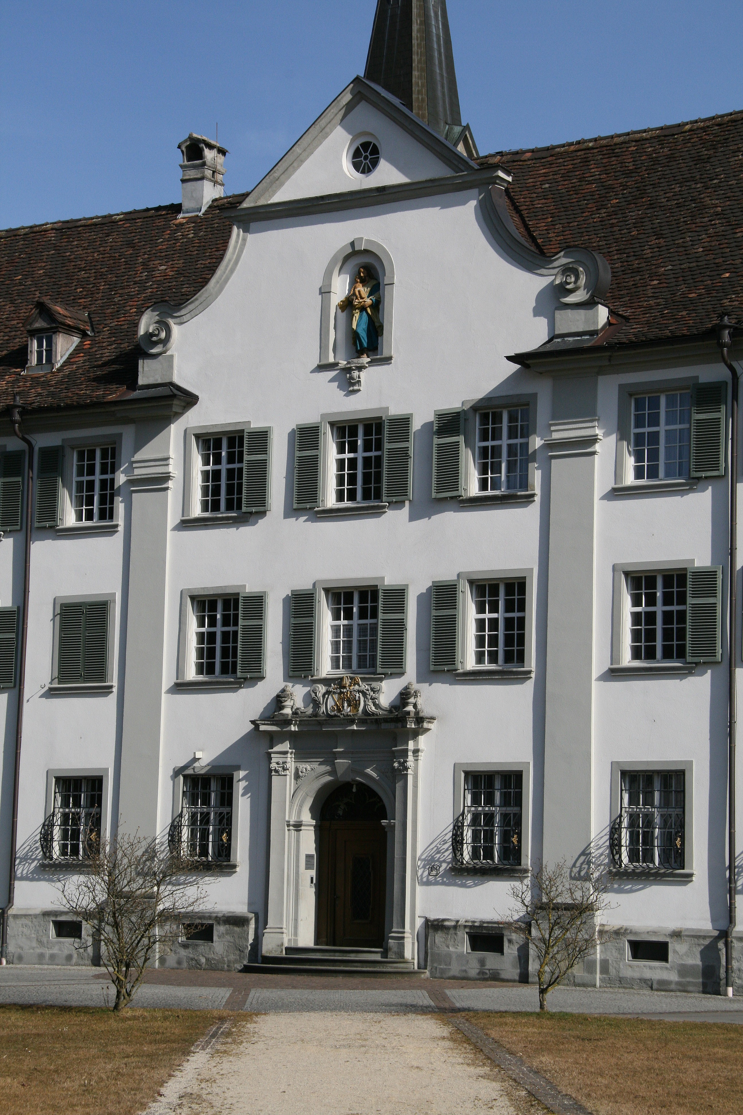 Die Mehrerau wurde 1097 von den Mönchen des Benediktinerklosters Petershausen (Konstanz) gegründet. Viele Jahrhunderte wirkten die Benediktiner segensreich am Bodensee und weit darüber hinaus. 1803 wurde das Kloster durch die Wirren der Zeit aufgehoben und die Mönche vertrieben. 1854 kauften die Zisterzienser von Wettingen das Anwesen und ließen sich hier nieder. Sie übernahmen das benediktinische Erbe und führen deren Tradition weiter. *** In Bregenz, Vorarlberg.